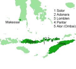 Portugiesische Einflusssphäre auf den Kleinen Sundainseln und dem Süden Sulawesis im 16. und 17. Jhr.